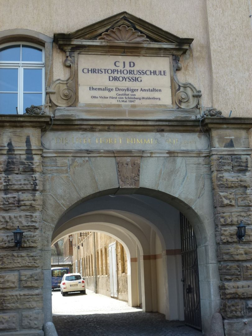 Tor der Christophorusschule in Droyßig